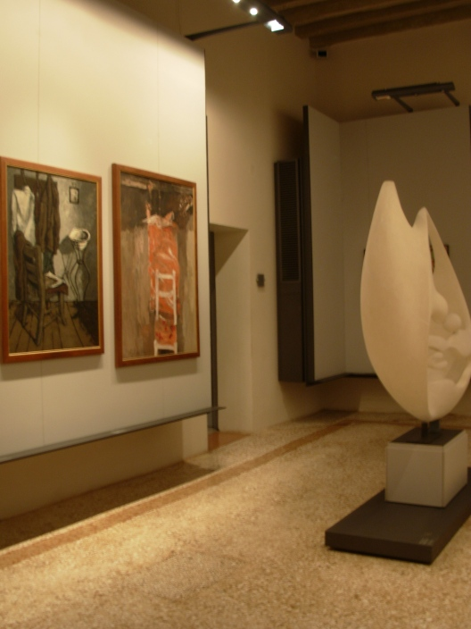 Venezia - Ca' Pesaro - Galleria Internazionale d'Arte Moderna